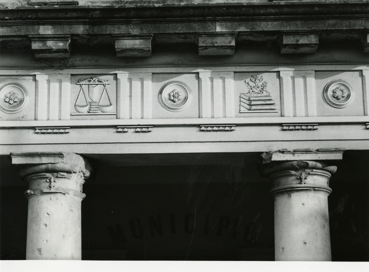 Servizio fotografico : Italia, 1982 / Paolo Monti. - Stampe: 3 : Positivo b/n, gelatina bromuro d'argento/ carta, 24x30. - ((Al verso delle stampe manoscritti i numeri dei negativi corrispondenti (formato 35 mm) con indicazione del fotogramma: 3790/18, 3790/21, 3790/22; timbro a inchiostro con copyright (Corso Sempione - Milano). - Confronta scheda 3790L01A-37A. - Sul coperchio della scatola iscrizione didascalica manoscritta a pennarello nero: "Architettura/ Lombardia Veneto". - Fonte: Agenda di Paolo Monti: Nikon Leika 3001-/ Monti 1978 (1978-1982), presso Archivio Paolo Monti